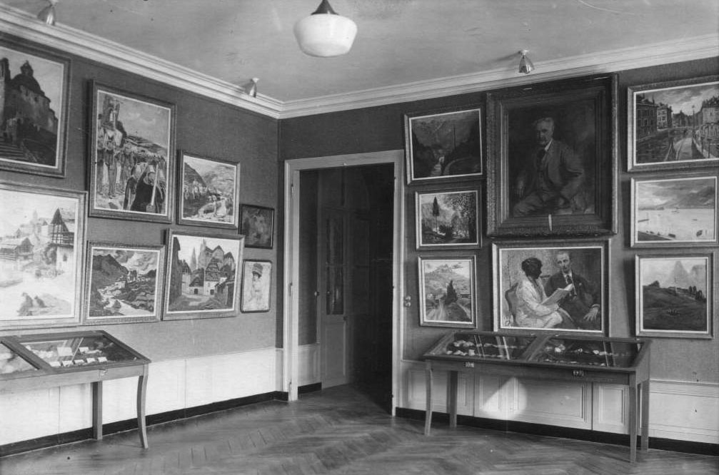 Vue intérieure du musée municipal au premier étage de la mairie de Montmorillon, circa 1938